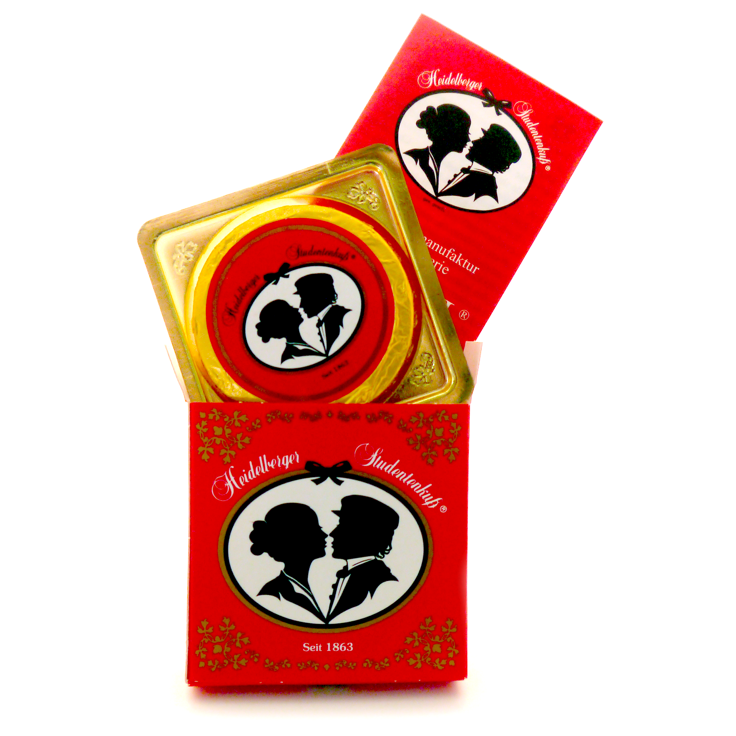 1er Packung Heidelberger Studentenkuß mit dazugehöriger Geschichte